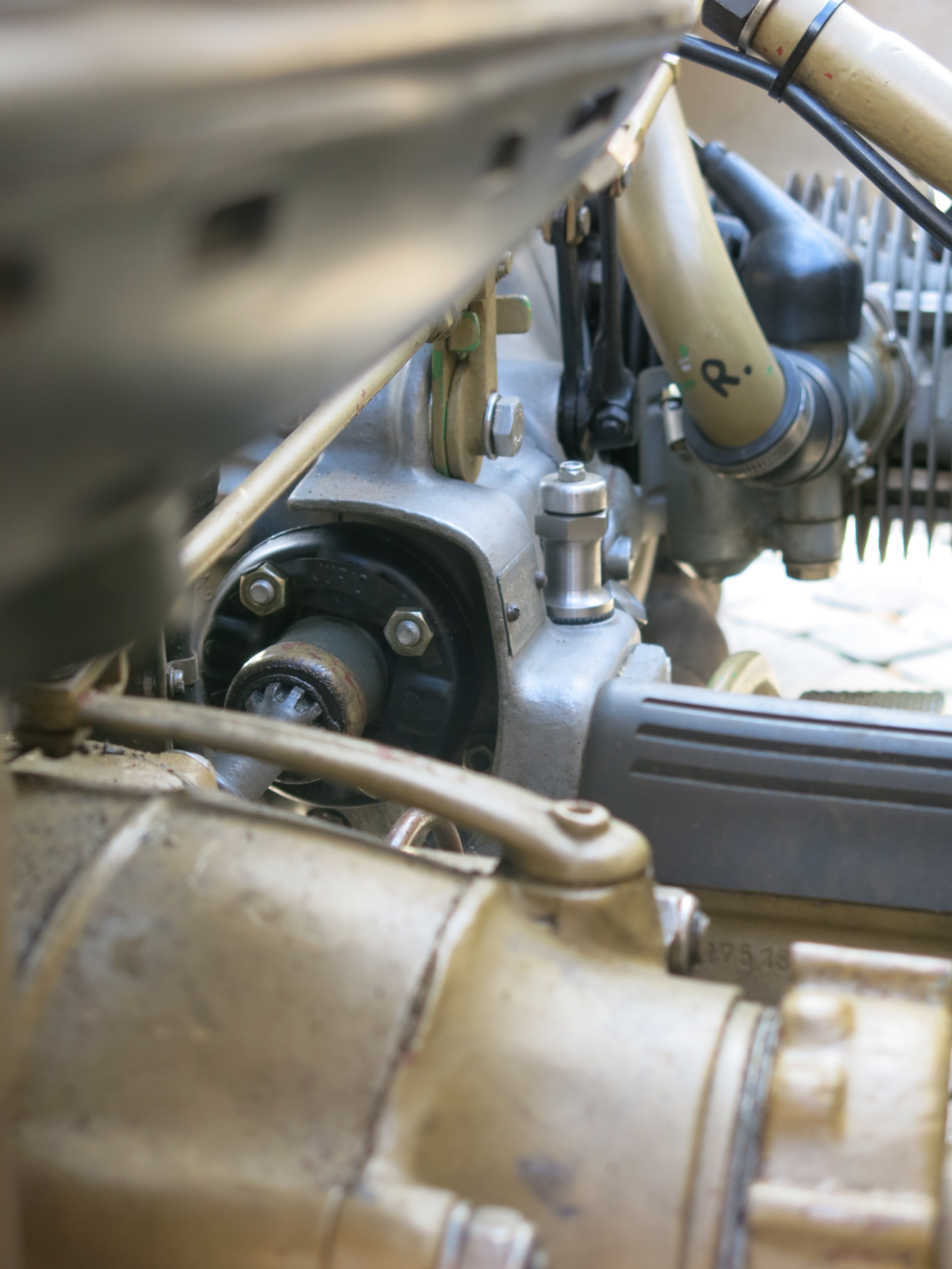 BMW R 75 Gespann, Beiwagenantrieb